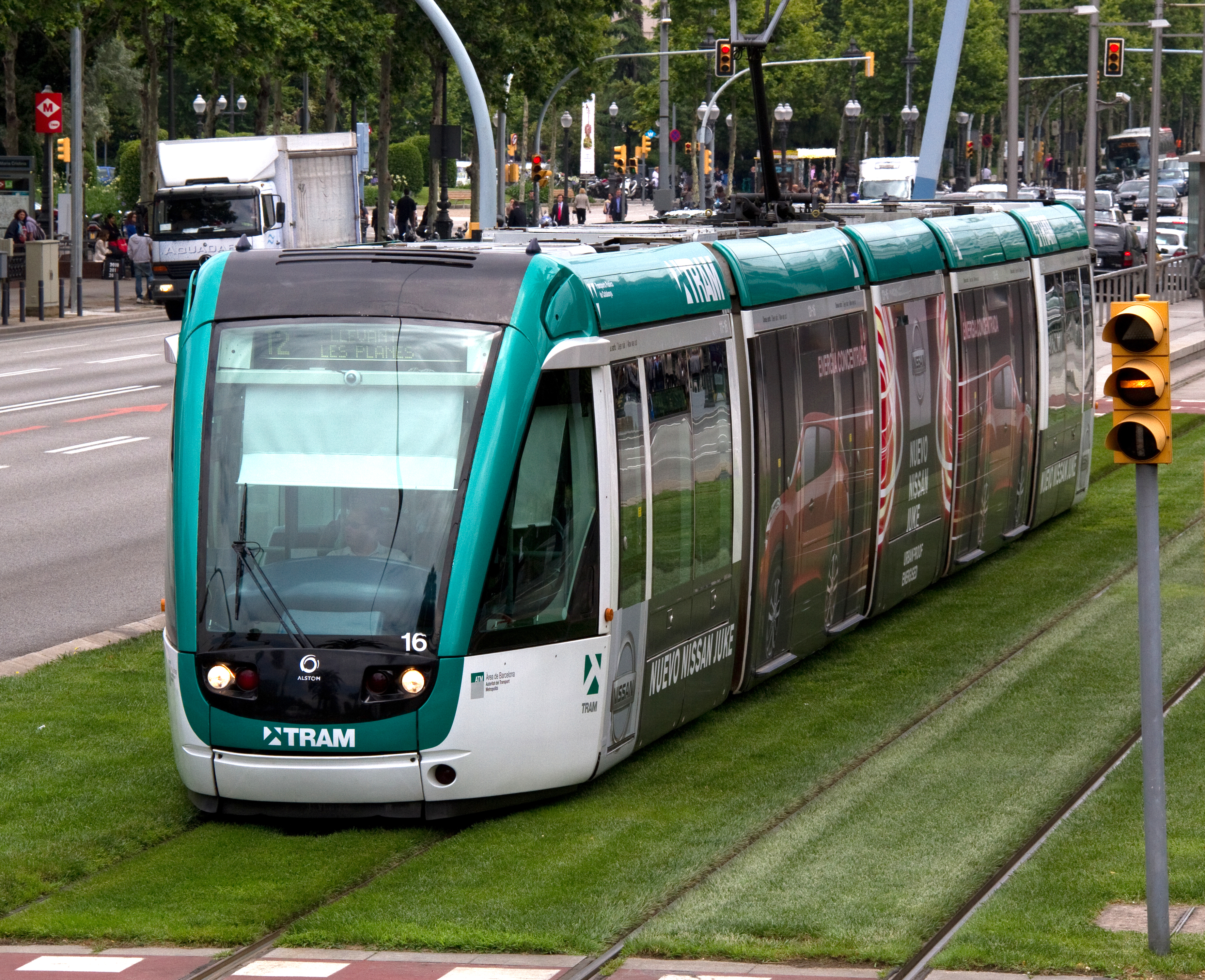 Barcelona Tram